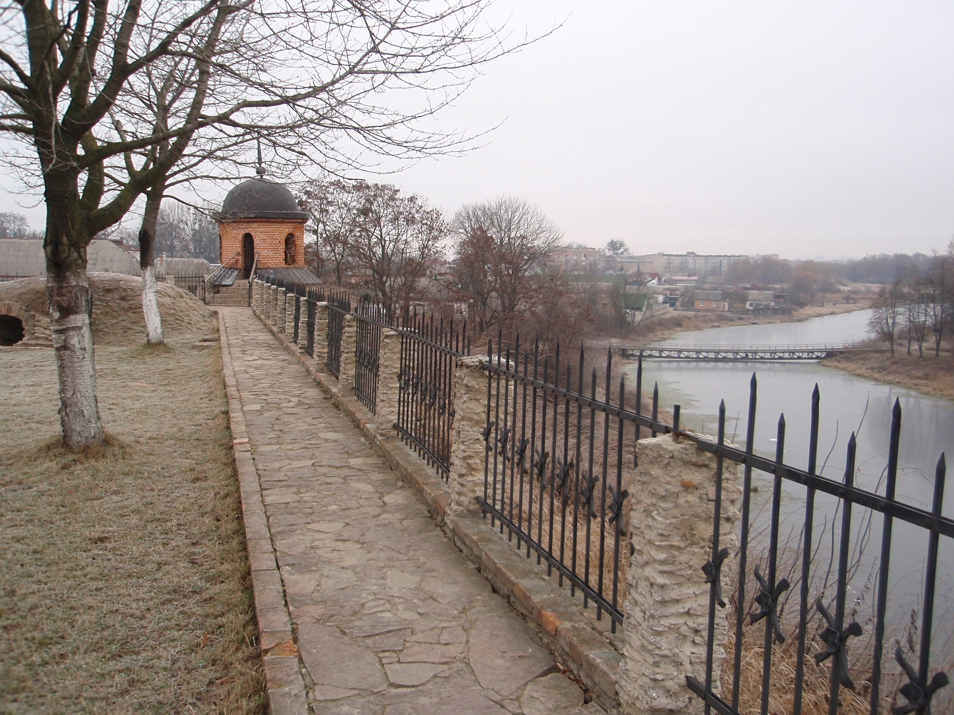 Дівоча вежа Дубенського замку: Дівоча вежа Дубенського замку